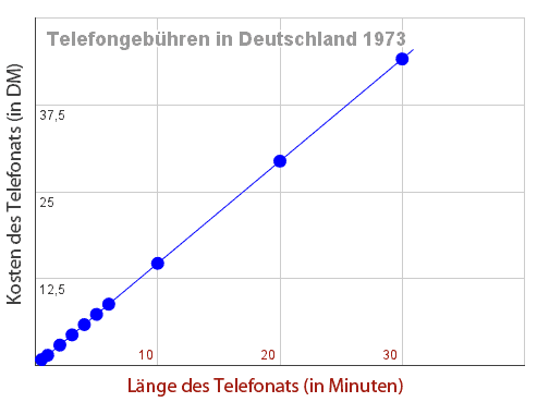 Telefongebühren 1973 in Deutschland. Rechts aufgetragen ist die Länge des Telefonats in Minuten, nach oben die Kosten in DM. Beispiel: Ein zahnminütiges Gespräch kostete 14,70 DM. Die Gebühren waren nach Distanz gestaffelt, sodass ein Telefonat mit einer 80 km entfernten Person billiger war als das einer Person, die 350 km entfernt war. Die Grafik zeigt die Kosten für ein Gespräch über eine Distanz von mehr als 300 km. Und sie zeigt, dass die Kosten zur Länge des Gesprächs proportional waren; es gab also keine Vergünstigung bei längeren Telefonaten. Diese Daten waren über die Bundesrepublik einheitlich, denn die Deutsche Post, ein Staatsbetrieb, hatte das Monopol auf die Telefonie.